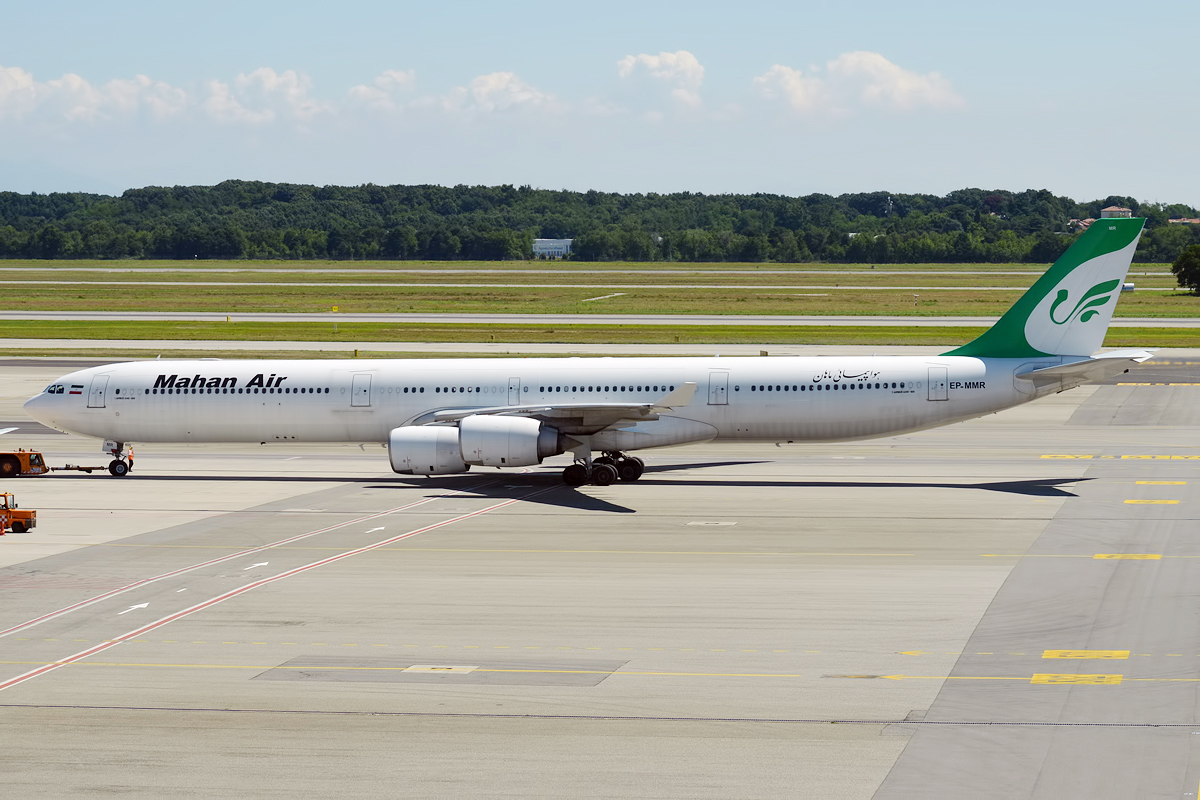 Mahan Air, EP-MMR, Airbus A340-642